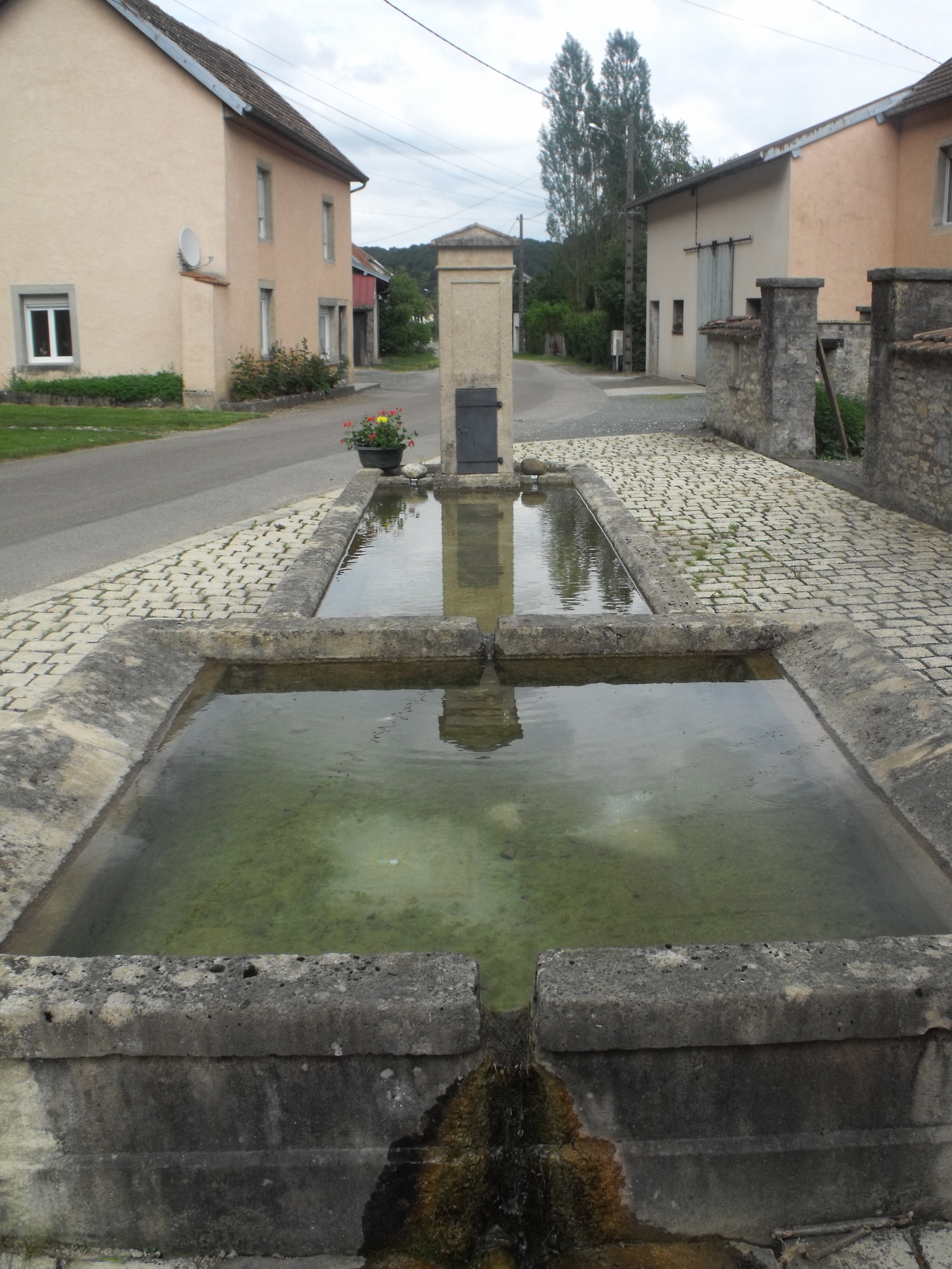 Fontaine à Sourans, Doubs, France